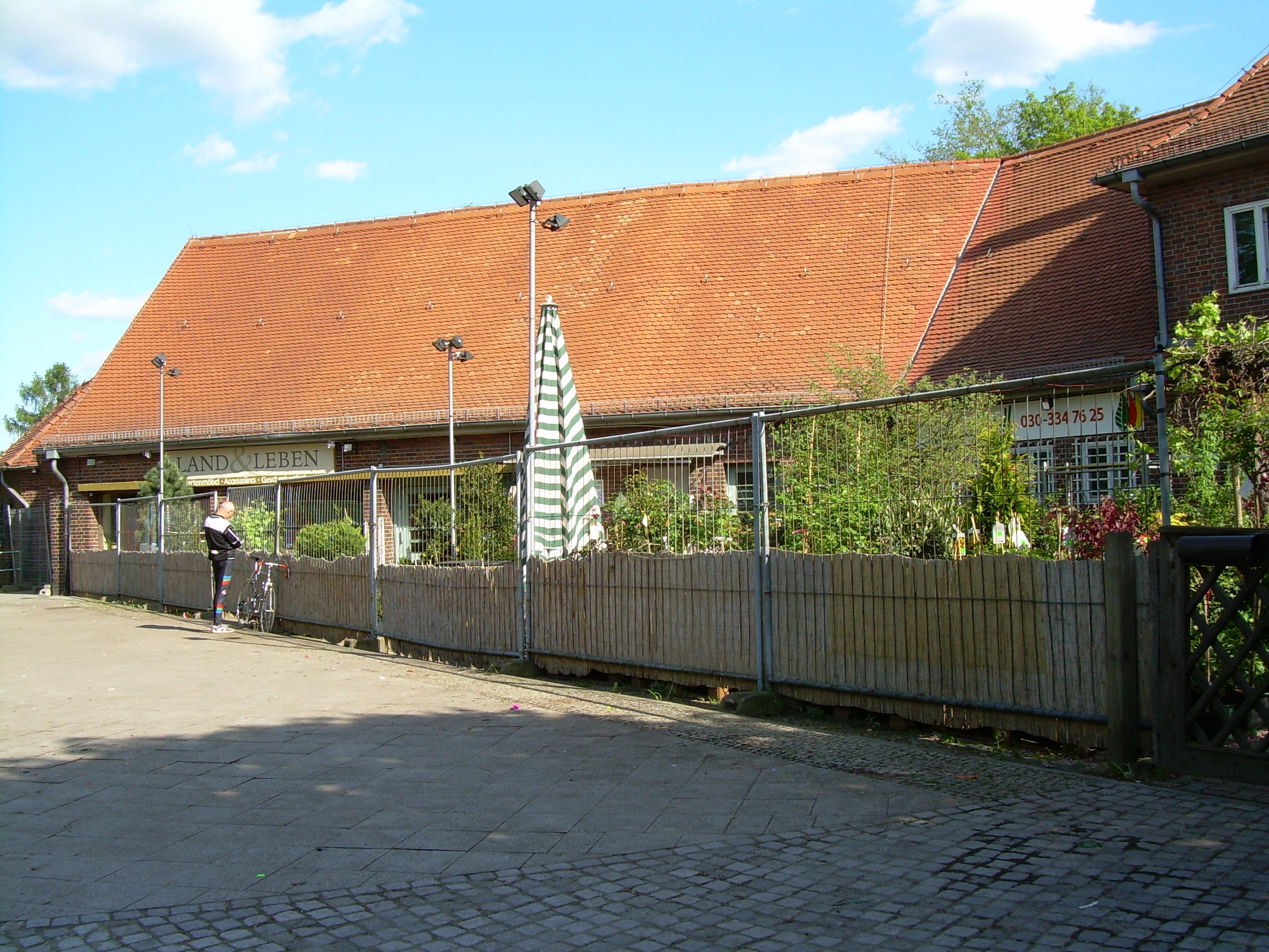 stillgelegter S-Bahnhof Gartenfeld in Berlin, Deutschland